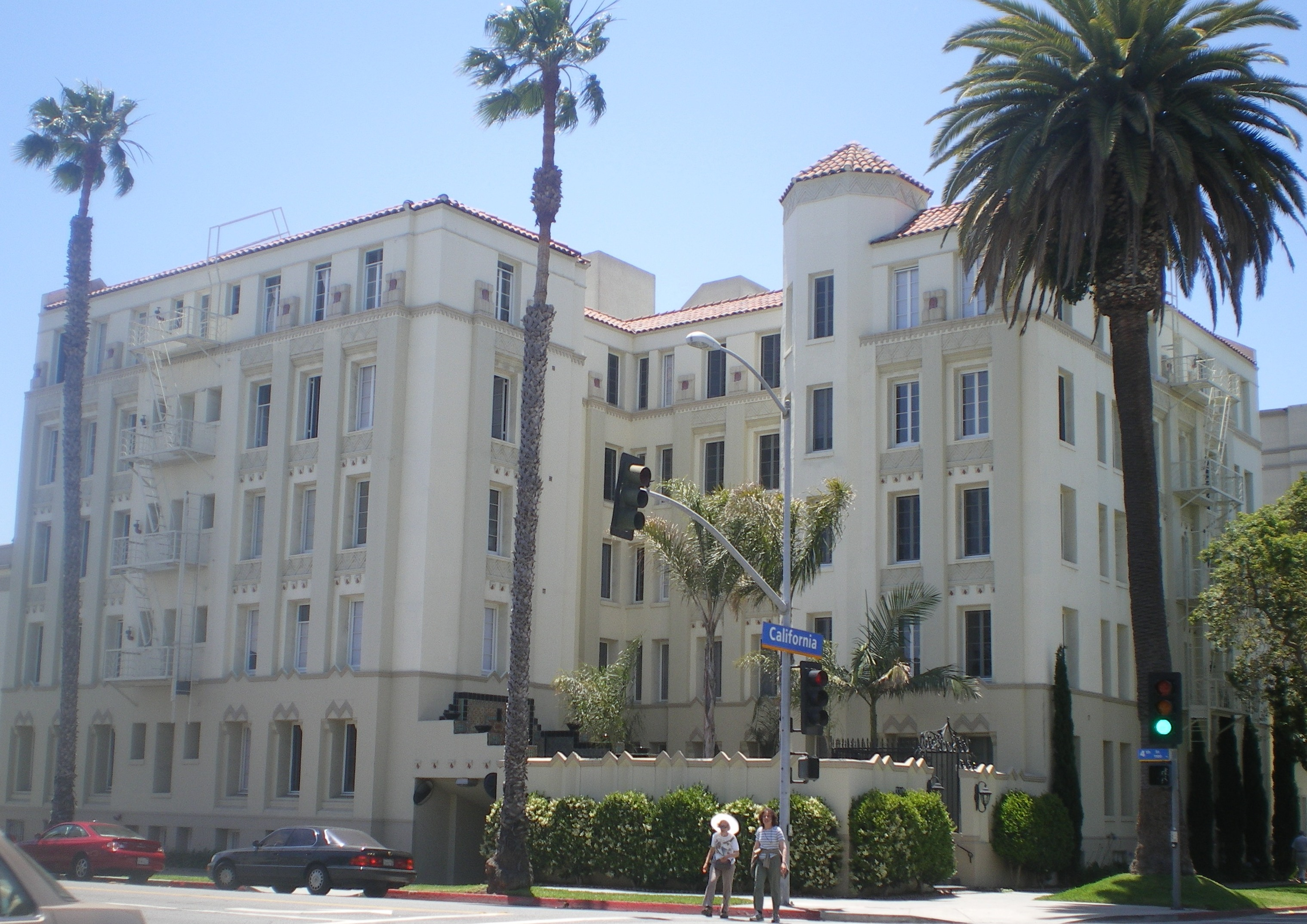 Charmont Apartments, 330 California Avenue, Santa Monica, California